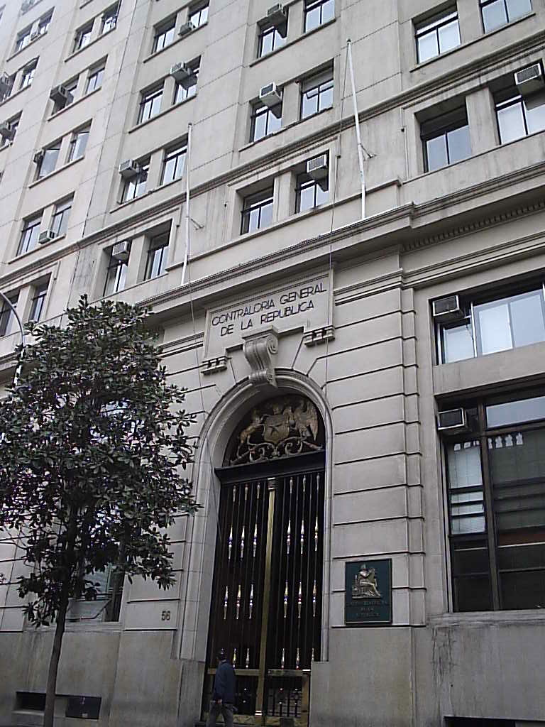 Contraloría General de la República de Chile Autor:Alstradiaan Alstradiaan Blog Fecha:Abril de 2005 Fotografía tomada con una cámara digital Olympus camedia D-395 de 3.2 megapixeles